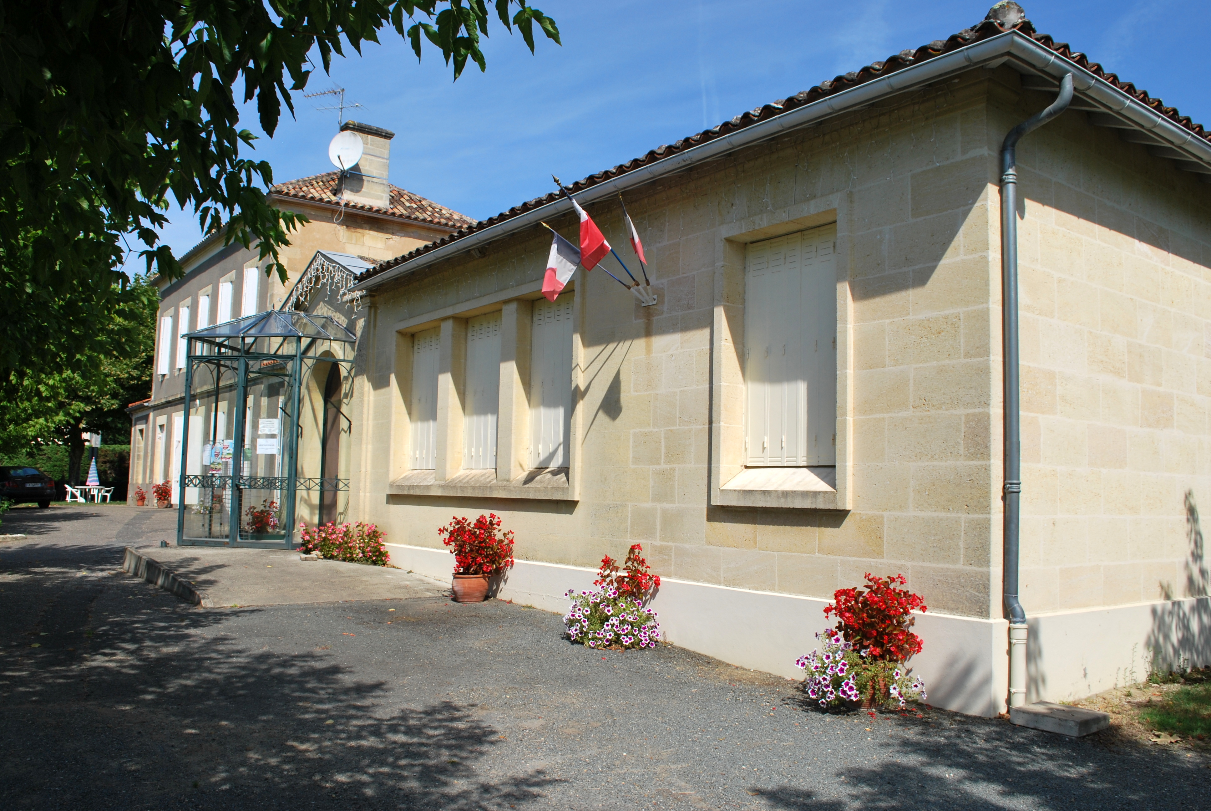 Saint-Etienne-de-Lisse Mairie